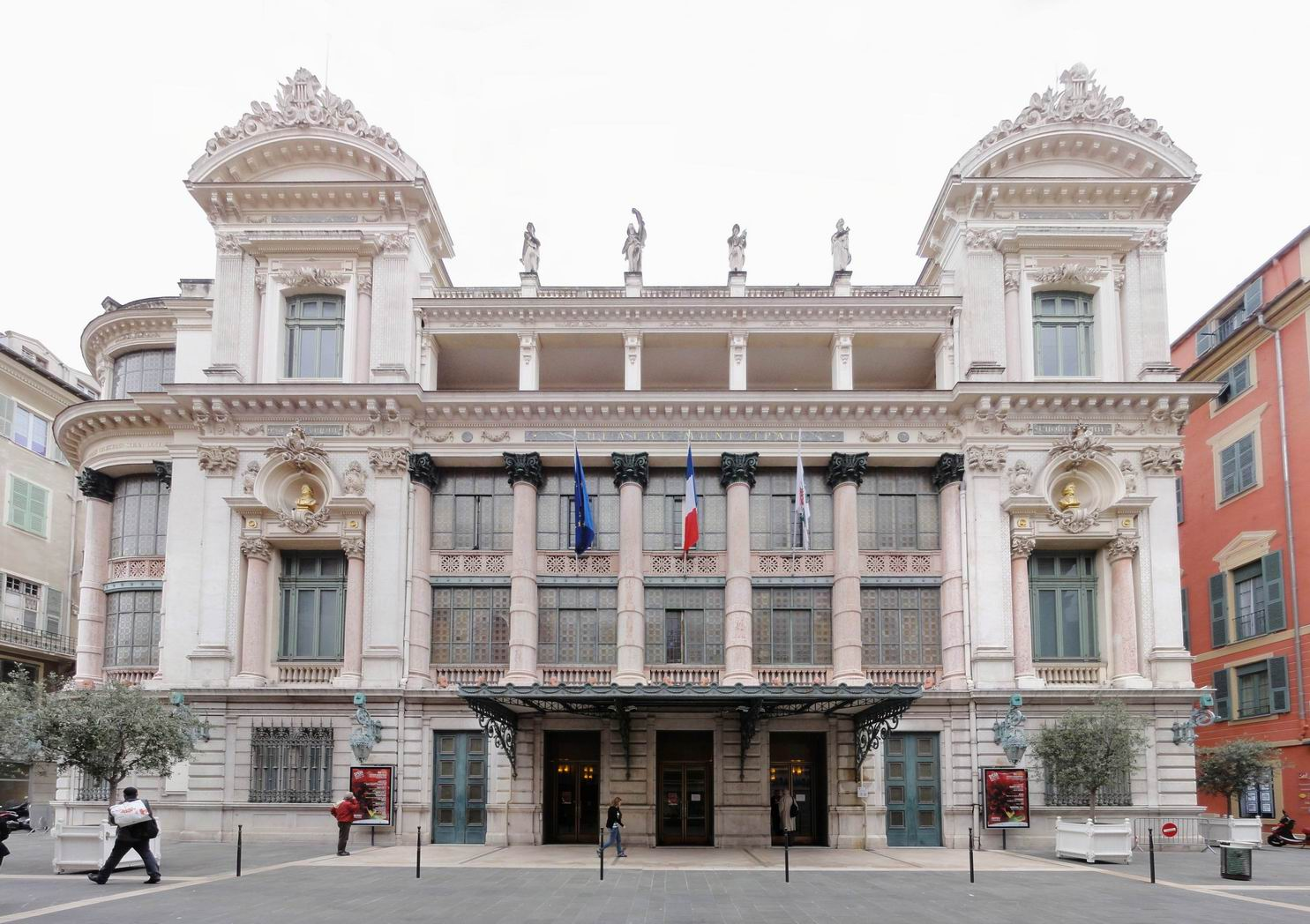 Façade nord, rue Saint-François de Paule